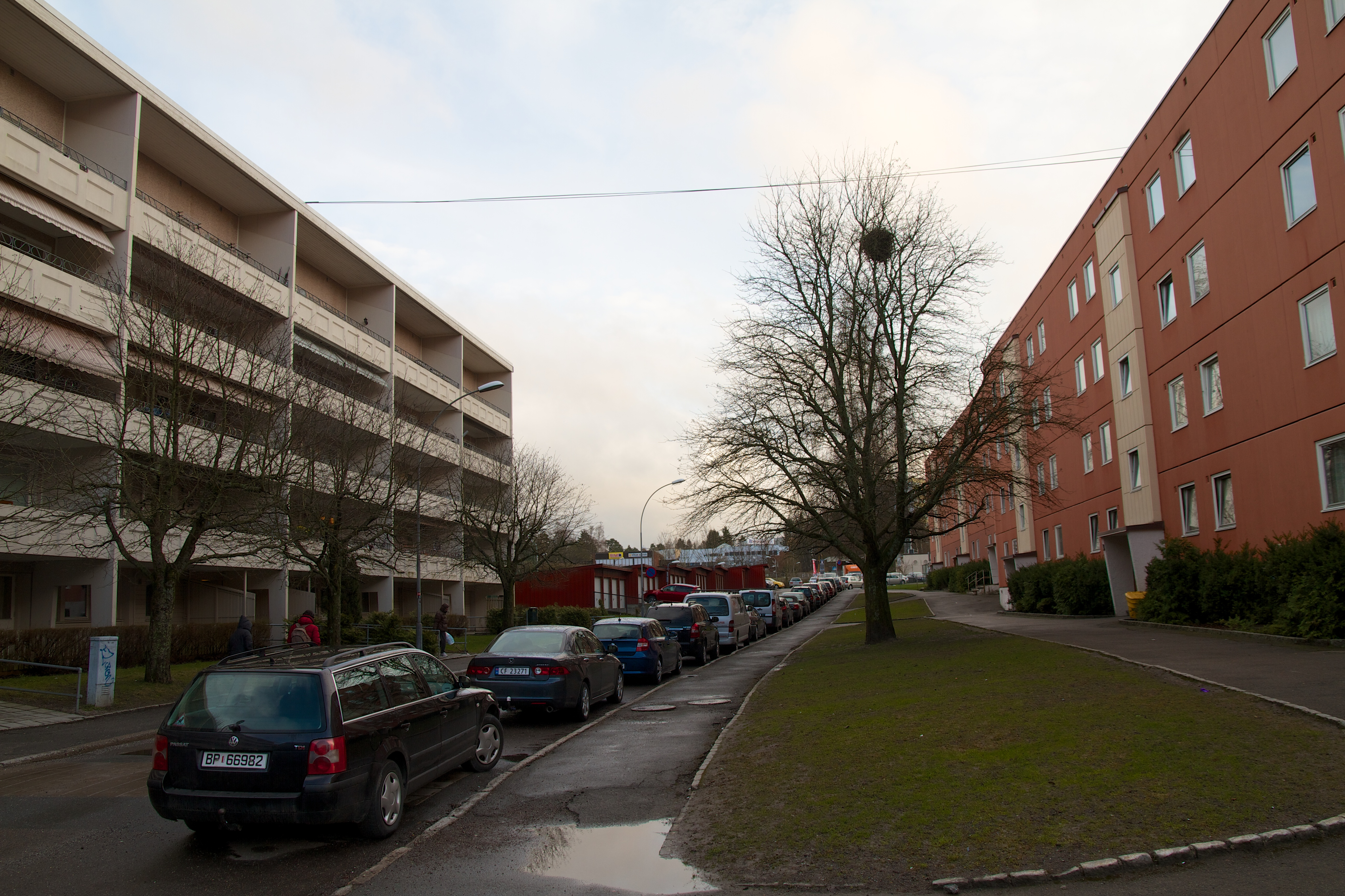 Martin Linges vei på Bogerud i Oslo.